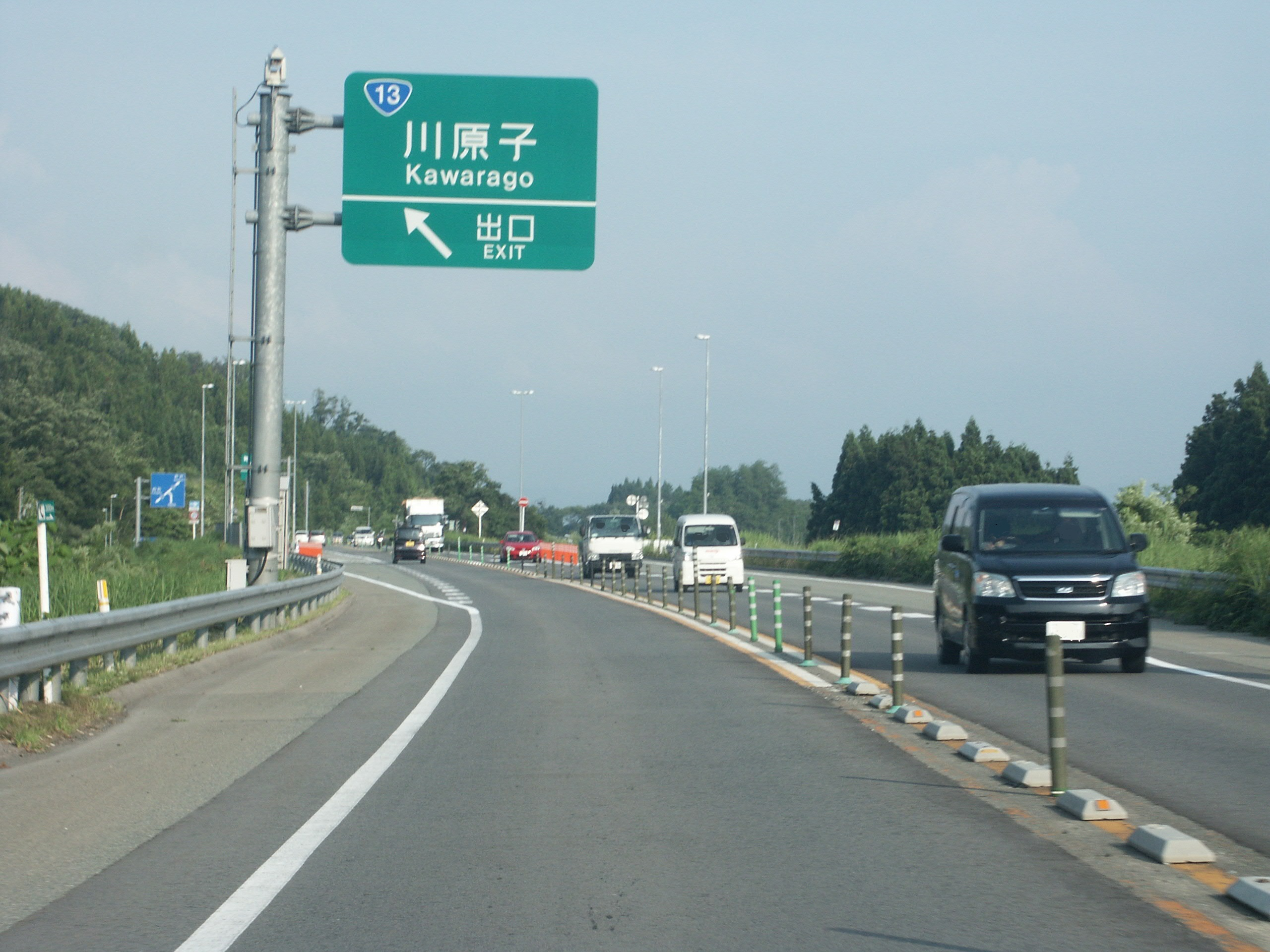 尾花沢新庄道路 河原子IC 出口付近